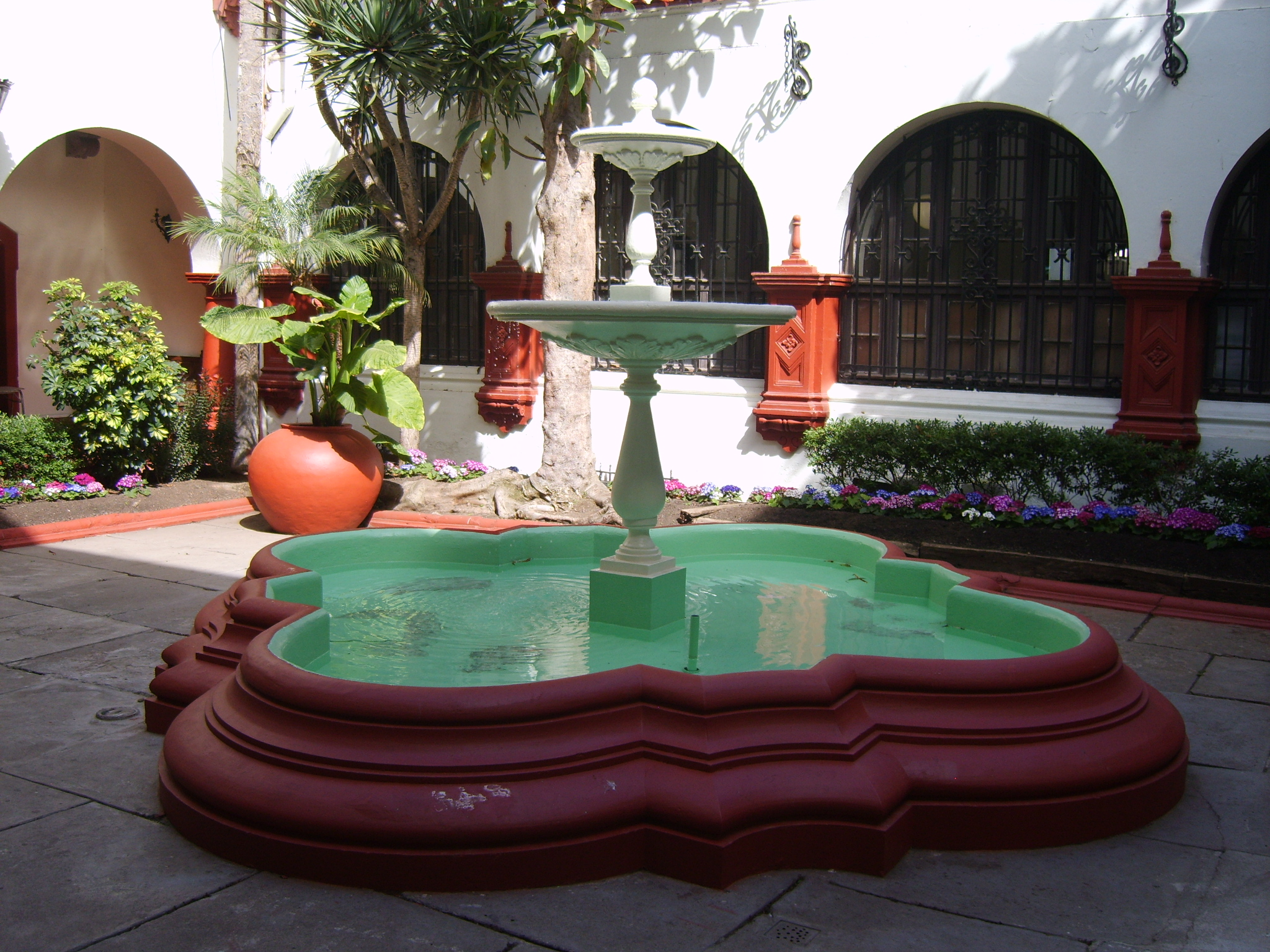 Pileta del patio interior de la Municipalidad de La Serena